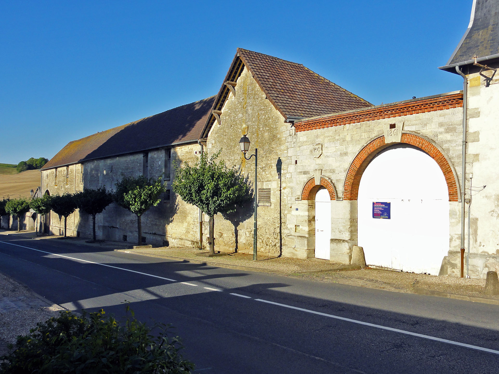 Ferme Second Empire à Charmont, Val-d'Oise, France.